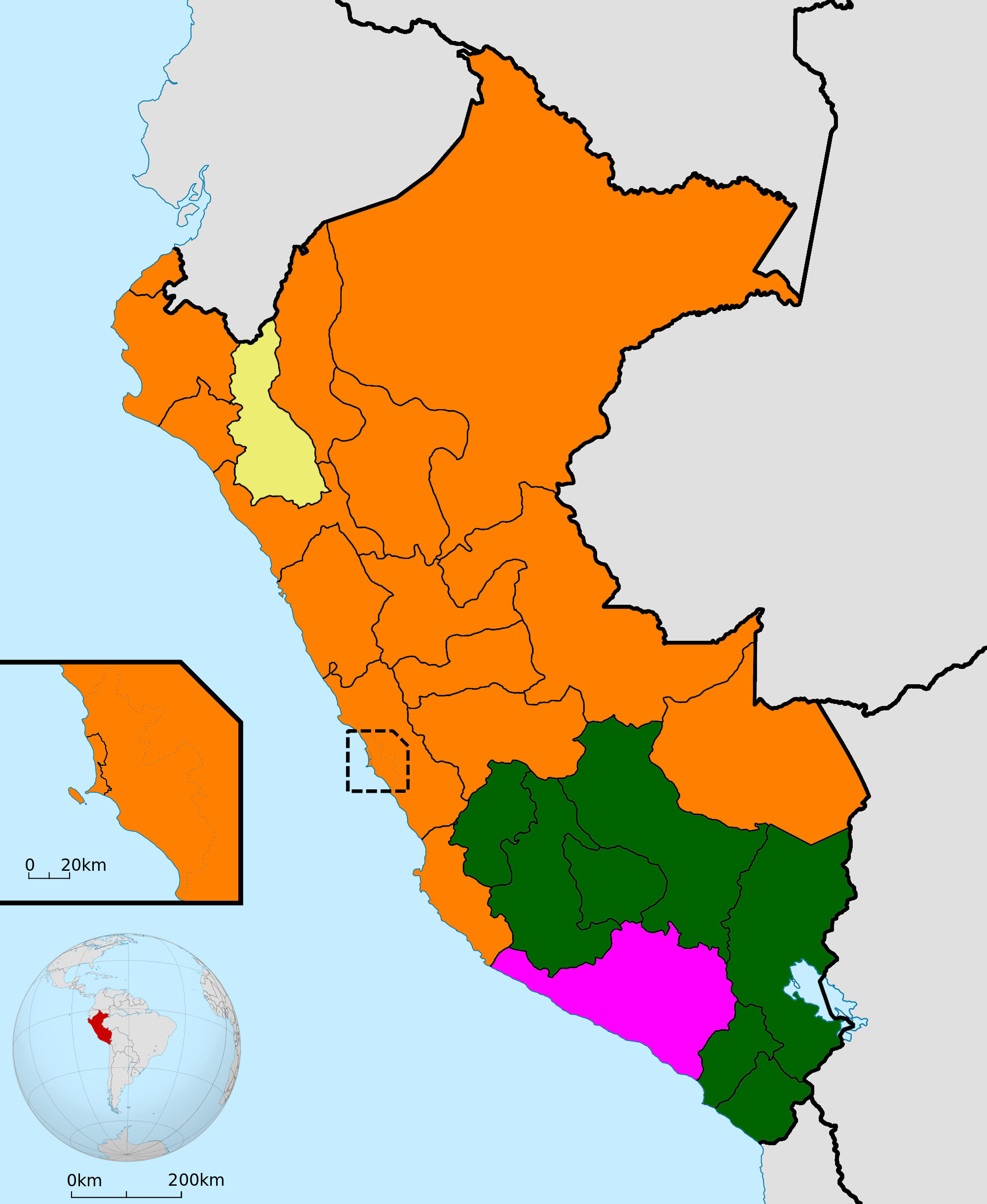 Resultados de la primera vuelta de Perú de 2016 por departamento.